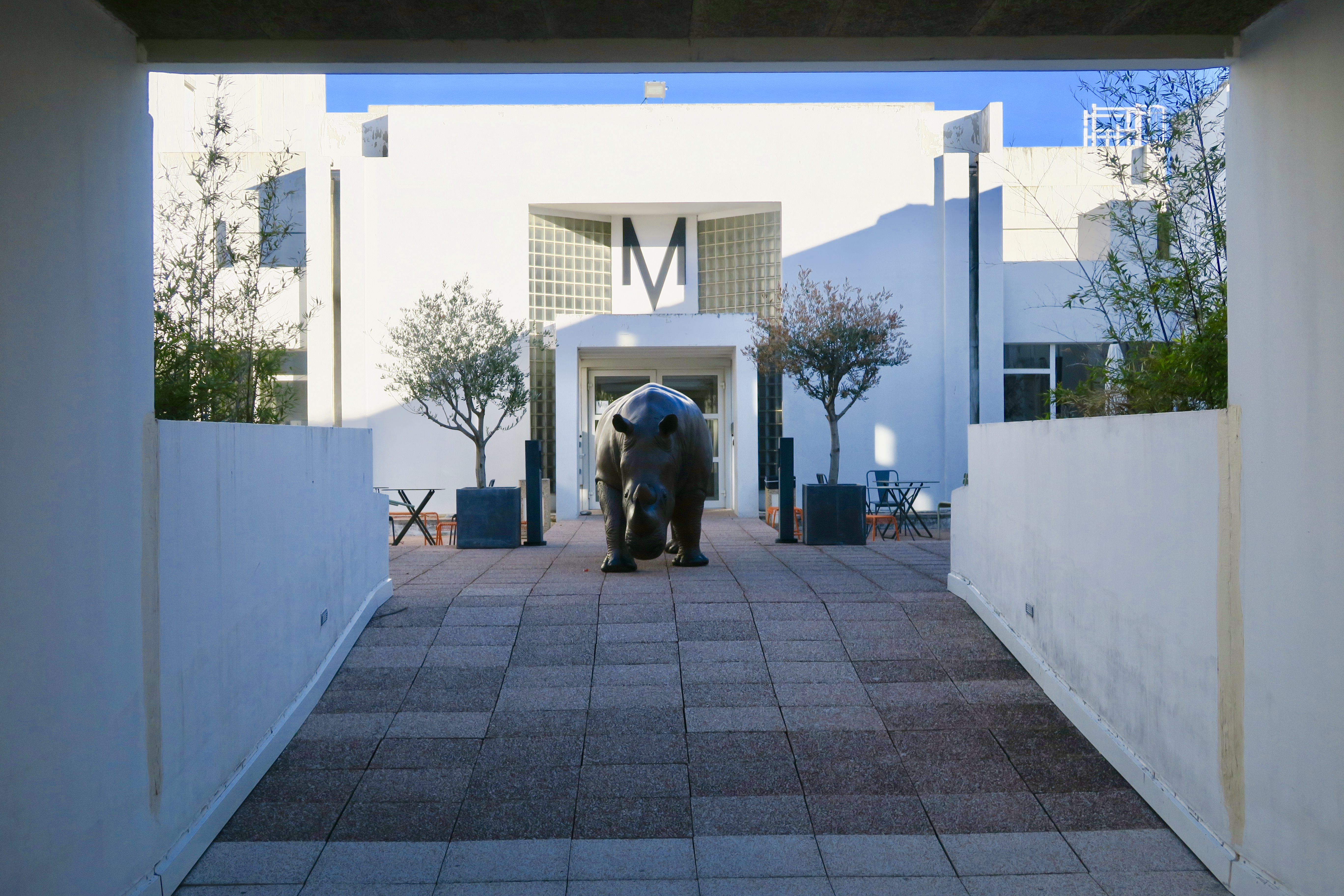 Entrée principale du BNM